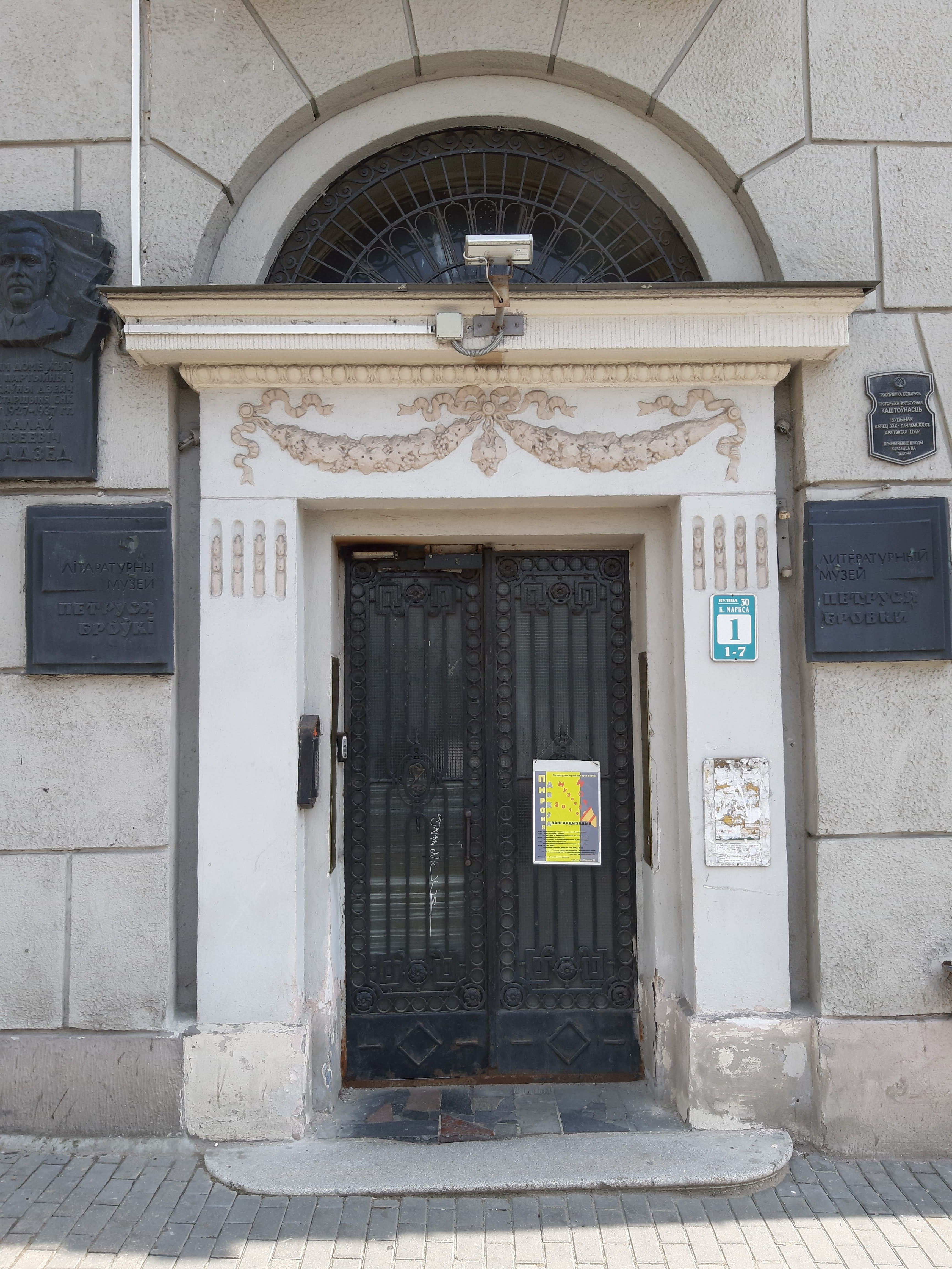 Мінск. Ад пл. Незалежнасці да Залатой Горкі